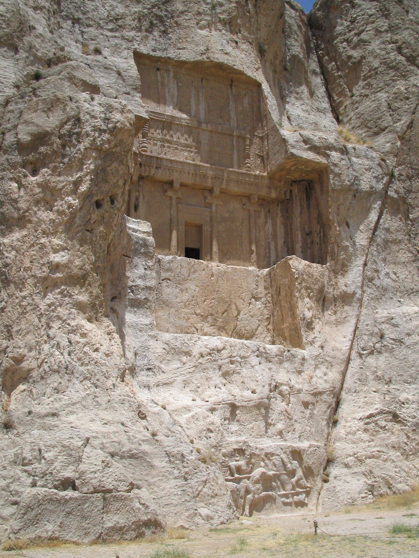 Tombe et bas-relief à Naghsh-e-rostam, Fars province, Iran.